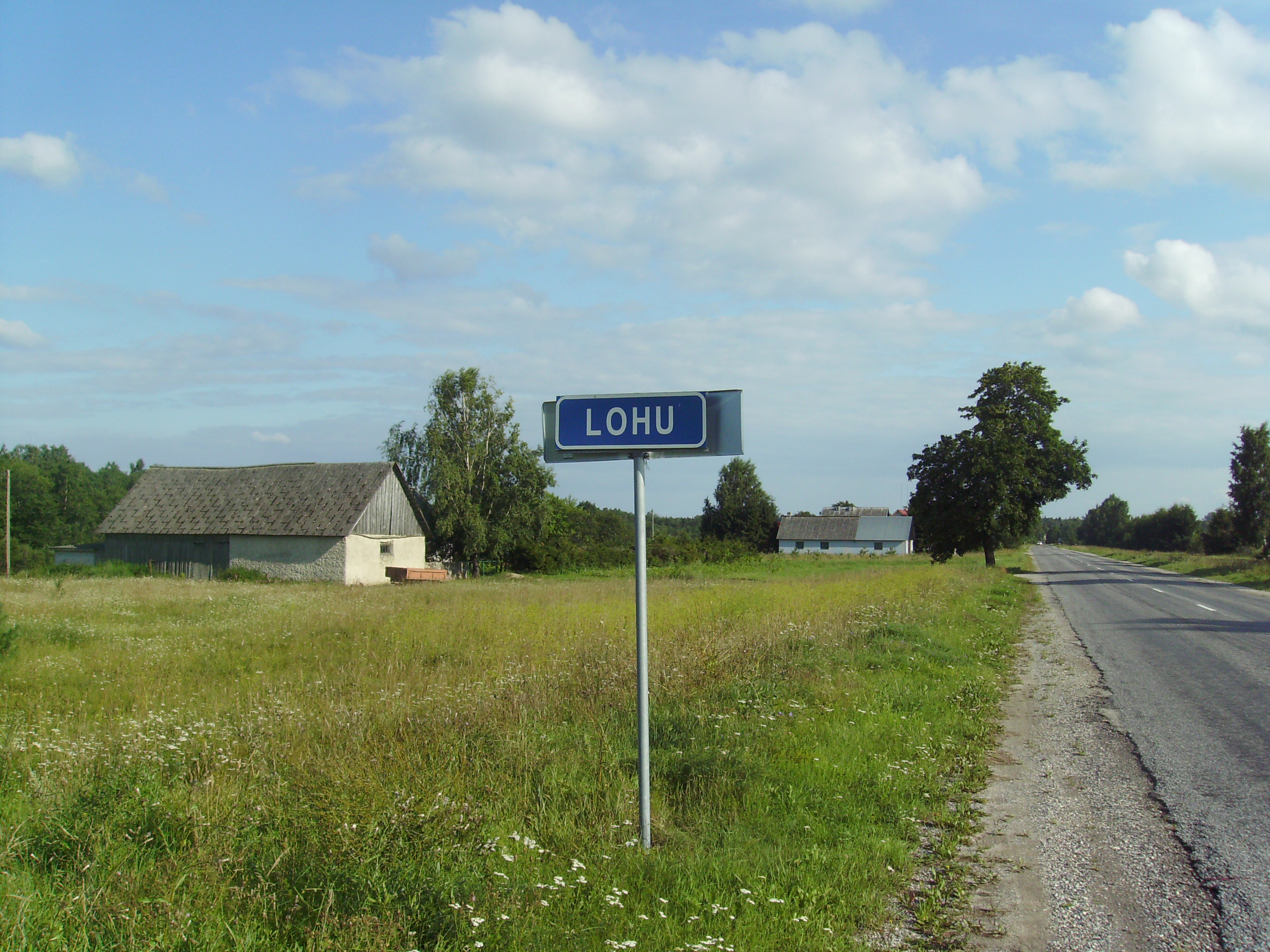 Lohu.